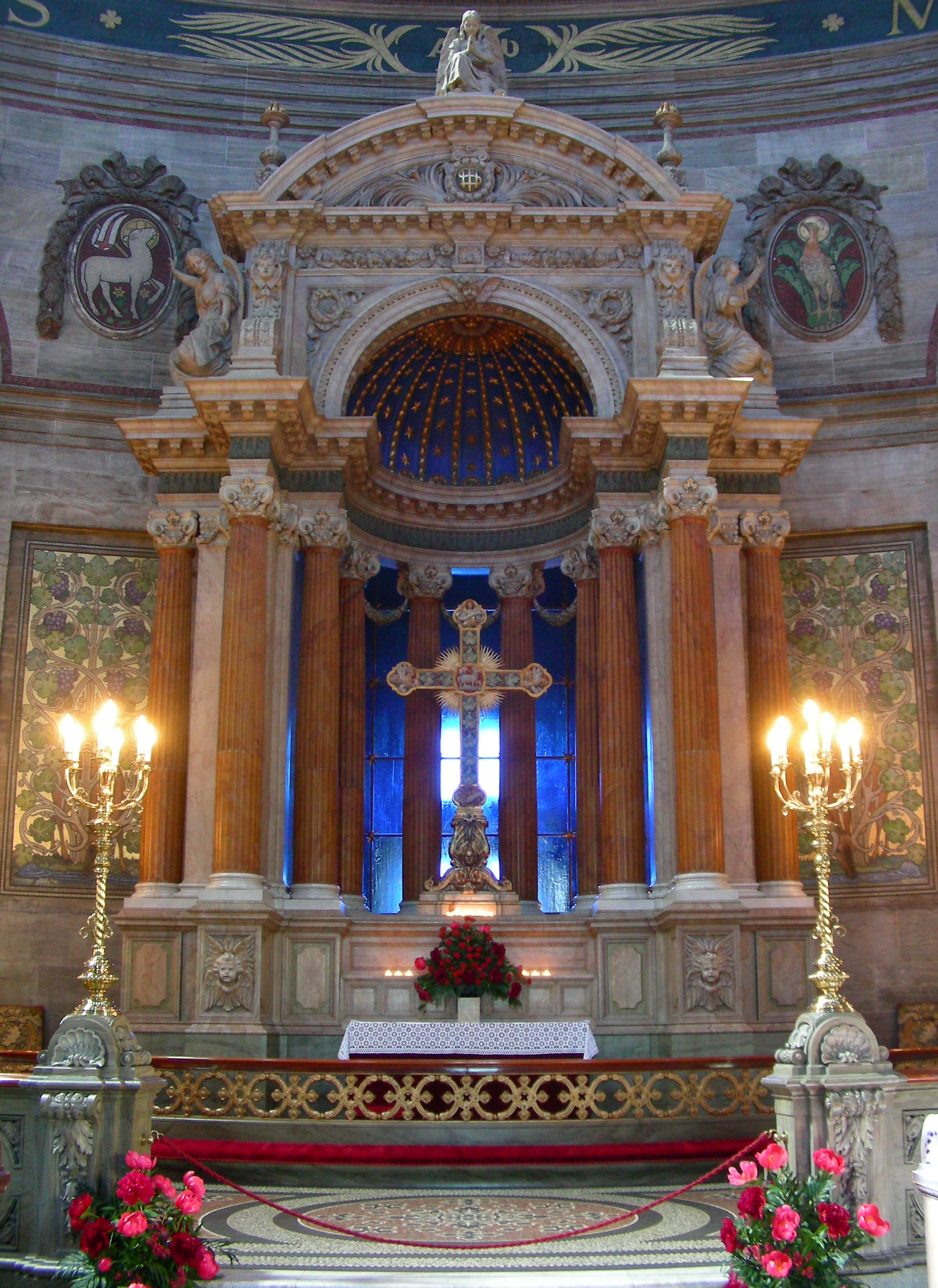 Marmorkirken, Copenhagen, Denmark. Altar.